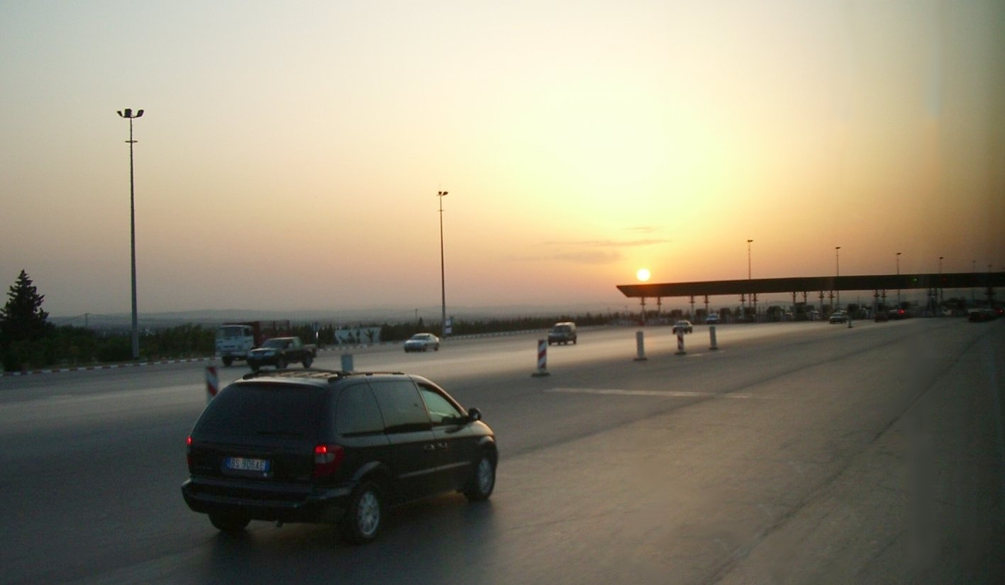 Autoroute de la costa